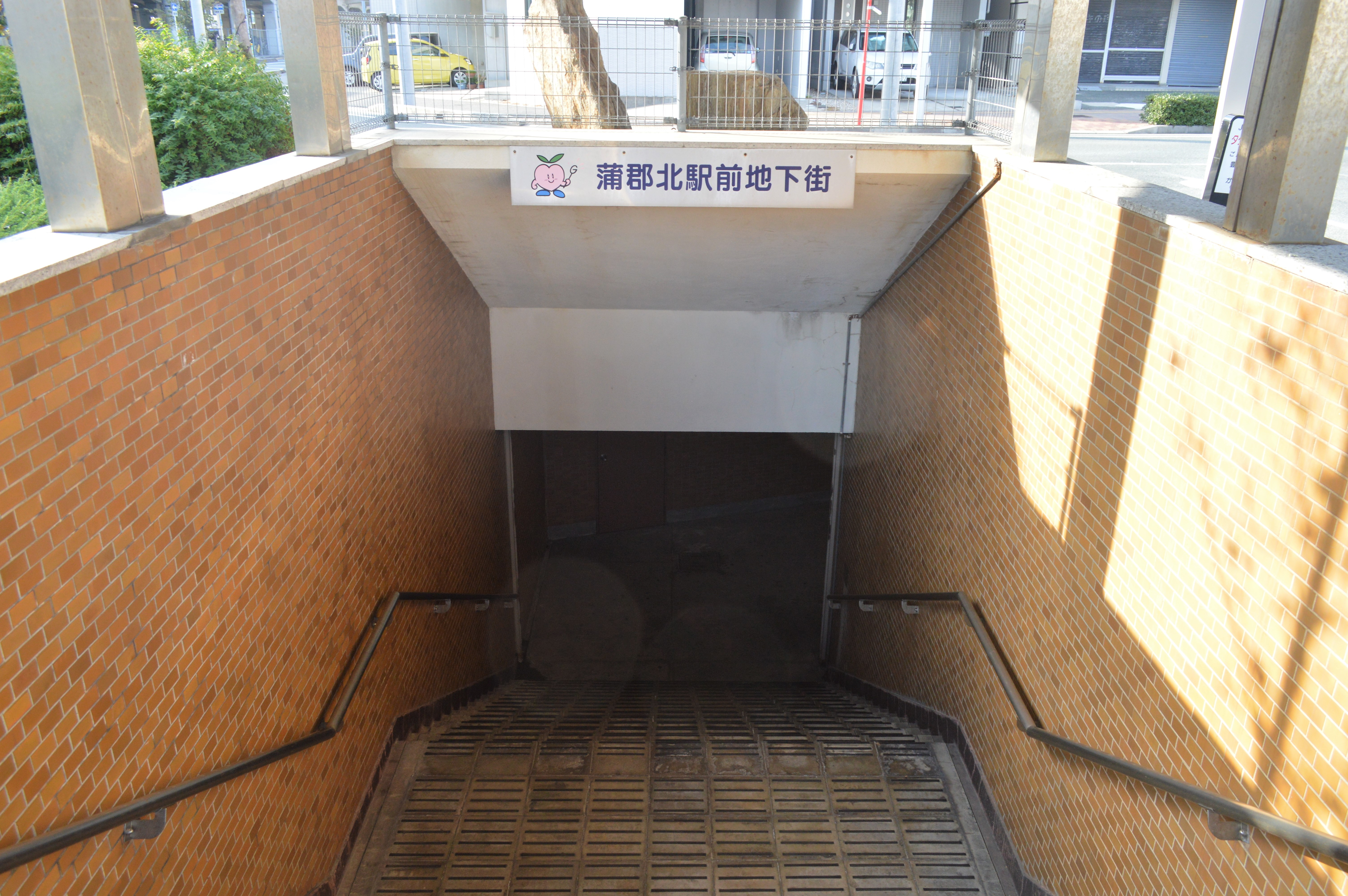 愛知県蒲郡市の蒲郡北駅前地下街。「日本一短い地下街」。